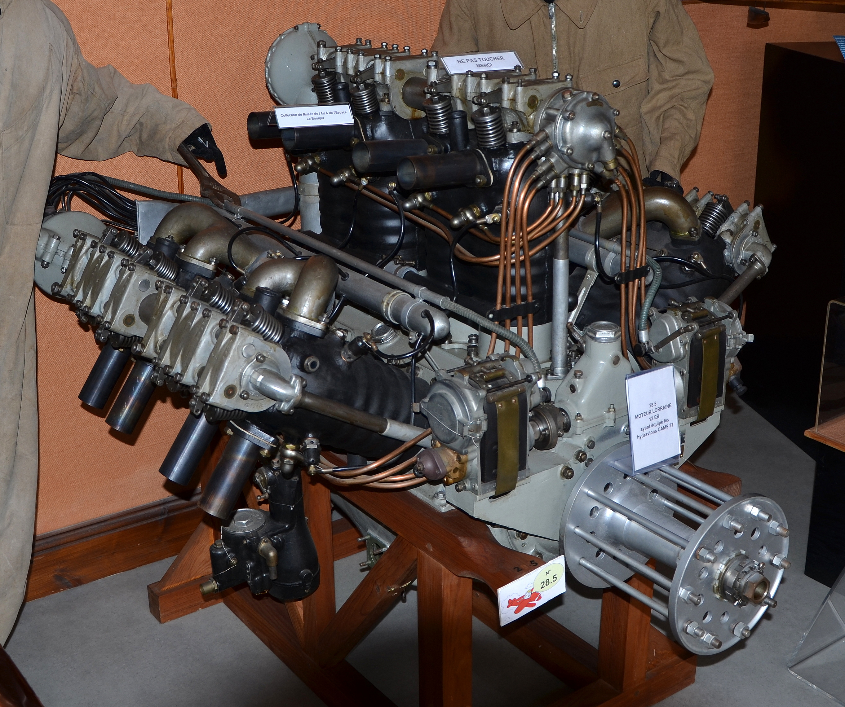 Moteur d'avions Lorraine 12 Eb ayant motorisé le CAMS 37, Musée historique de l'hydraviation, Biscarosse, France. Pret du Musée de l'Air. 450 ch à 1 850 tr/min 12 cylindres répartis en 3 séries faisant un angle de 60° refroidissement à eau masse : 435 kg cylindrée 24,4 litres